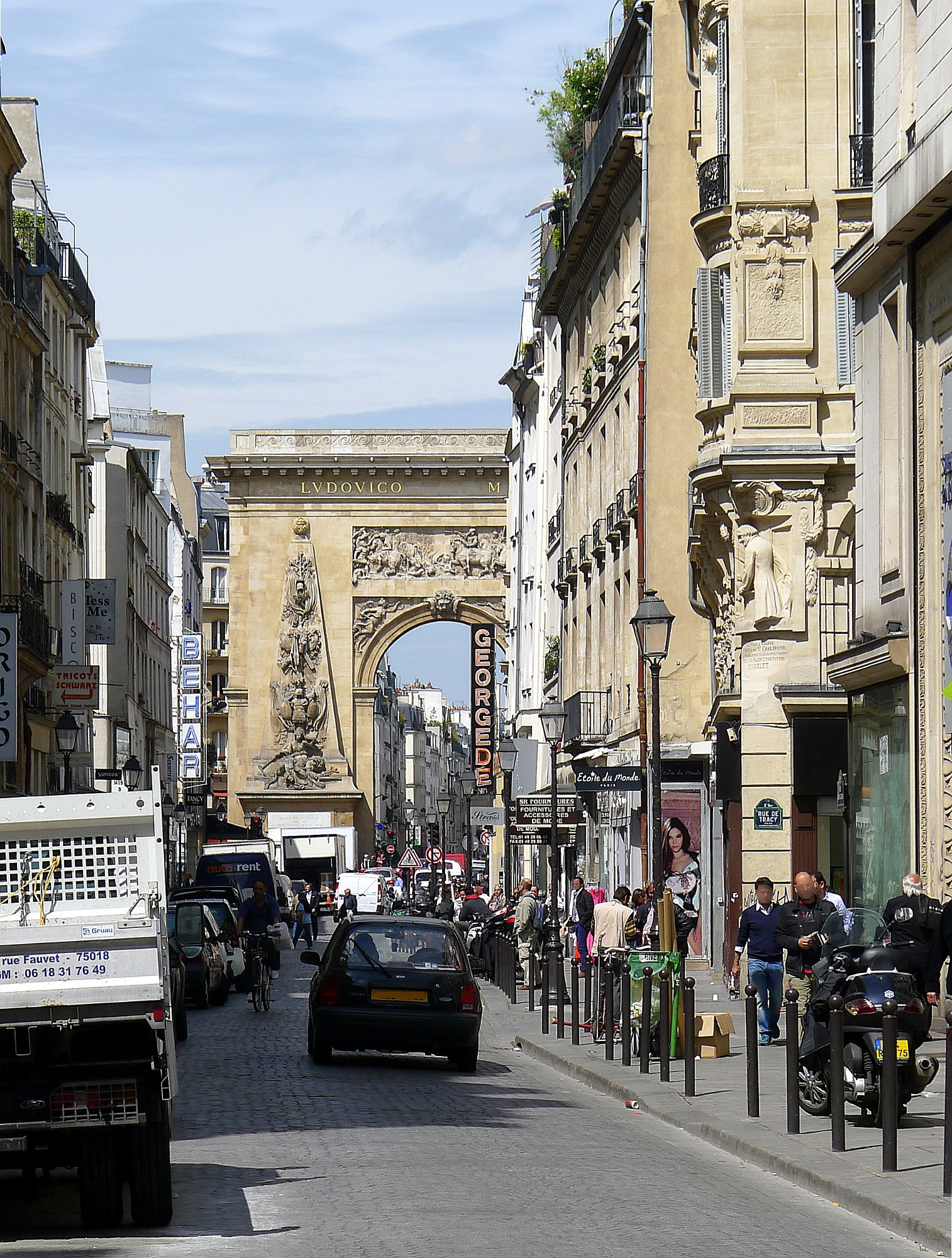 Rue et porte Saint-Denis - Paris II